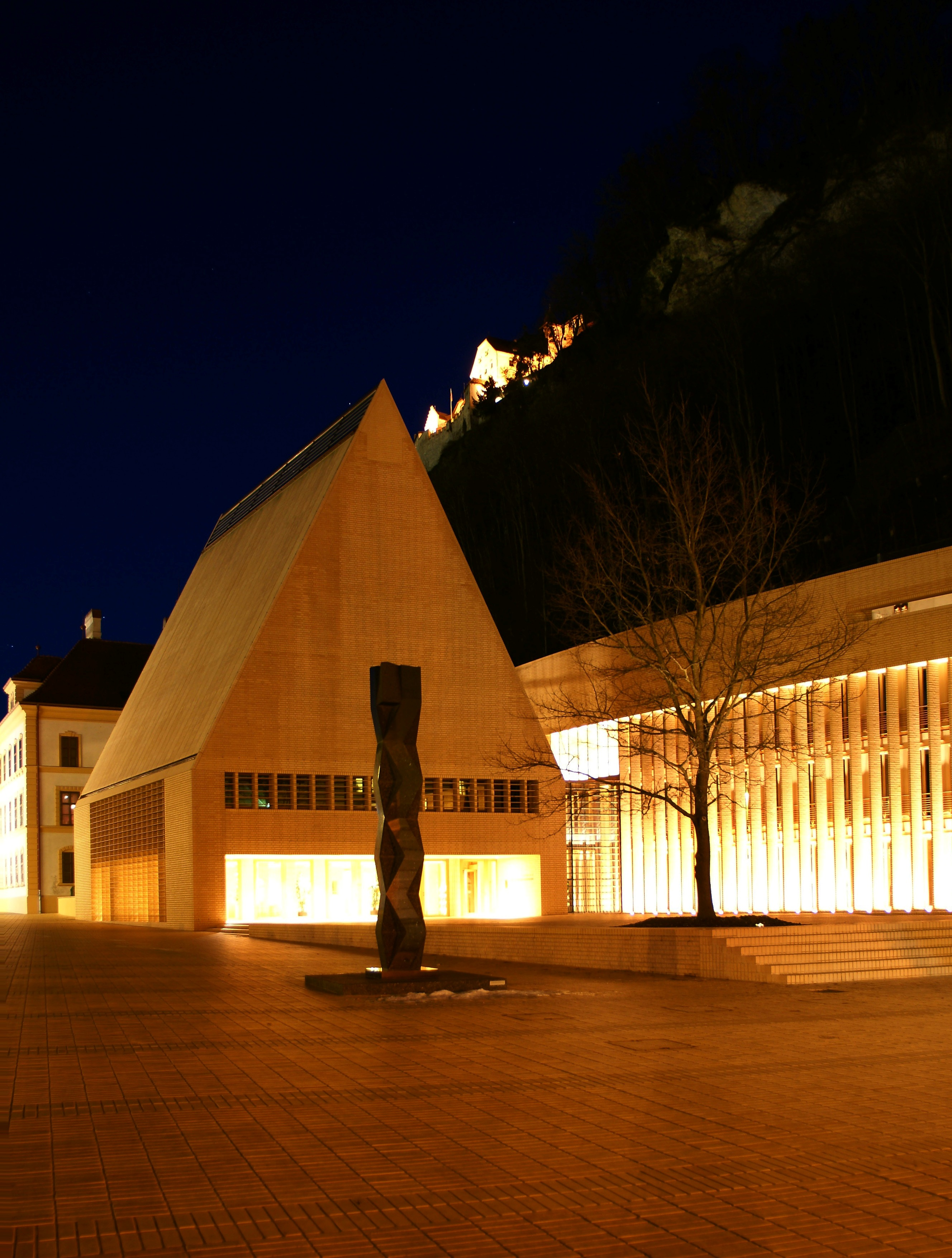 Details: Hohes Haus und Langes Haus des Liechtensteinischen Landtags in Vaduz erbaut 2007. Architekt Hansjörg Göritz.